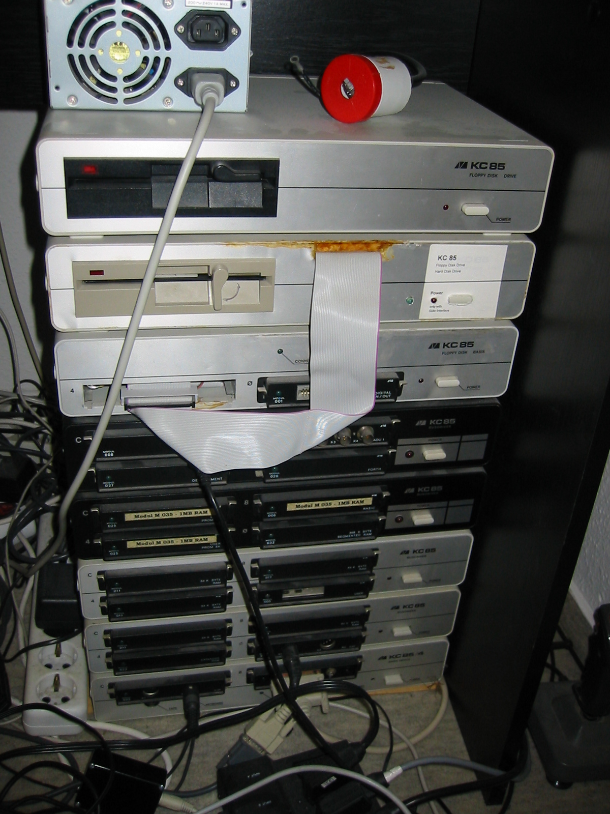 Beispielbild für ein KC 85/4 System mit Festplatte